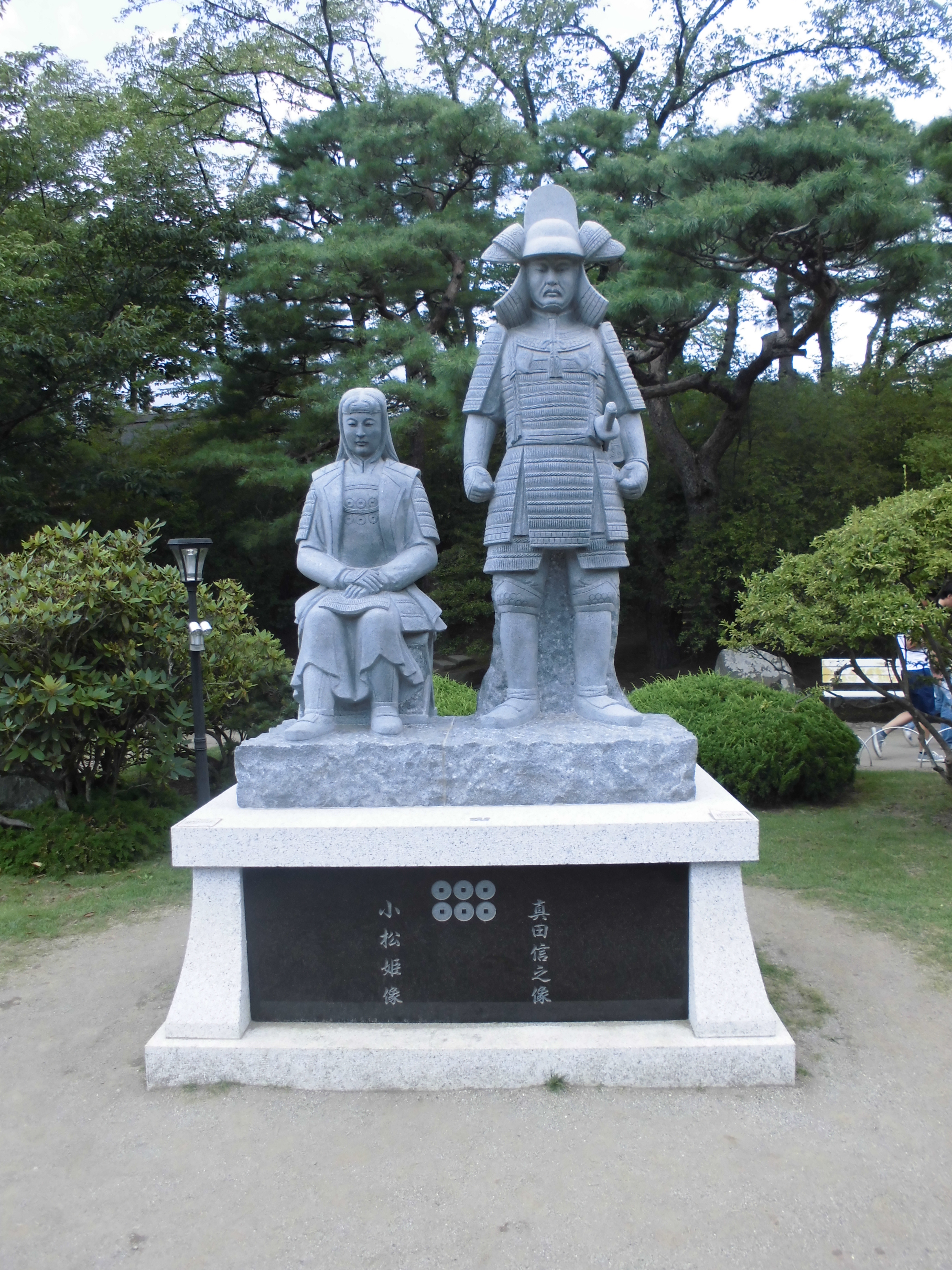 中文（香港）: 真田信之與小松姬雕像